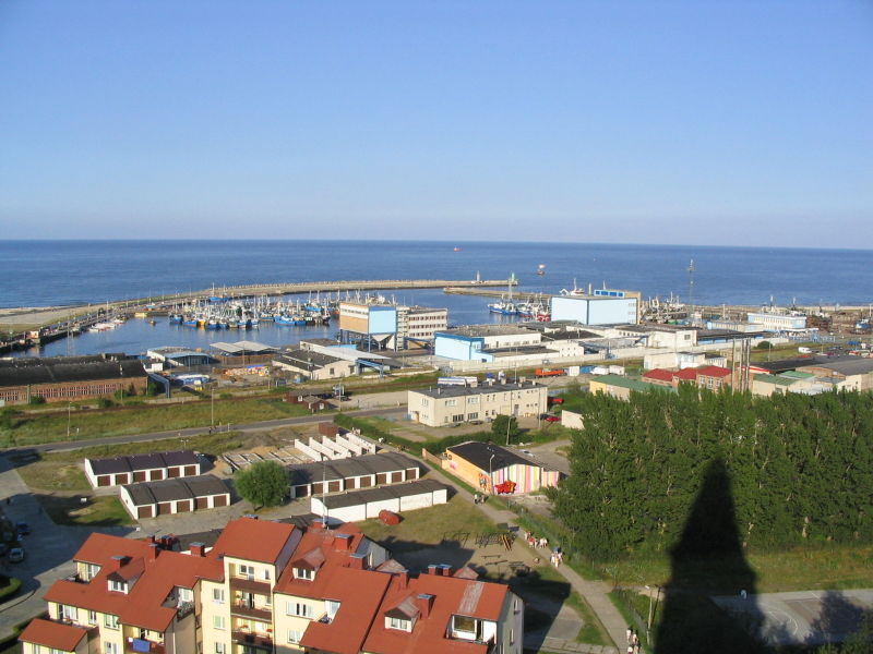 Port we Władysławowie